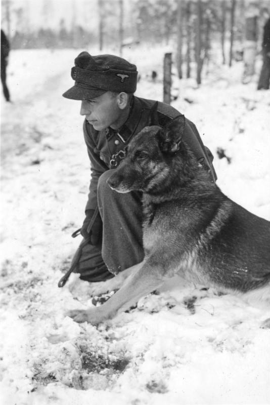 Information added by Wikimedia users. de: Waffen-SS in Norwegen, hier SS-Sturmmann mit Deutschem Schäferhund bei der Hundeausbildung en: Waffen-SS in Norwegian, here SS-Sturmmann with German Shepherd Dog on dog’s training ru: Ваффен-СС в Норвегии, СС-Штурмманн с Немецкой овчаркой он подготовке